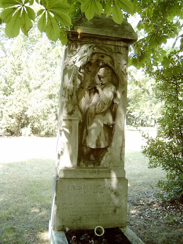 Kacsóh Pongrác sírja Budapesten. Kerepesi temető: 10-1-61. [szobrász: Füredi Richárd]